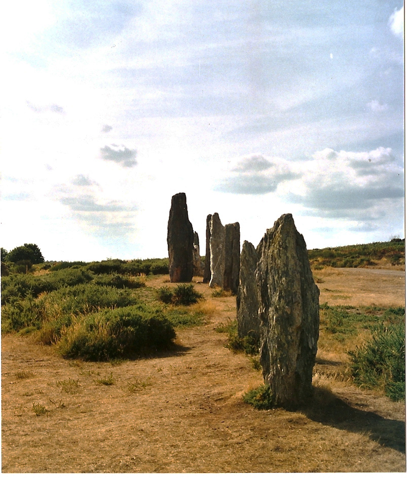 L'alignement de menhirs de Saint Just en Ille-et-Vilaine (France).